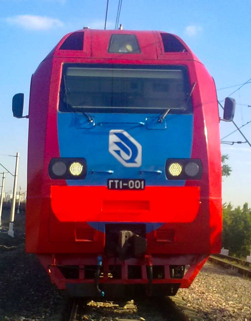 Газотурбовоз ГТ1-001. Вид спереди